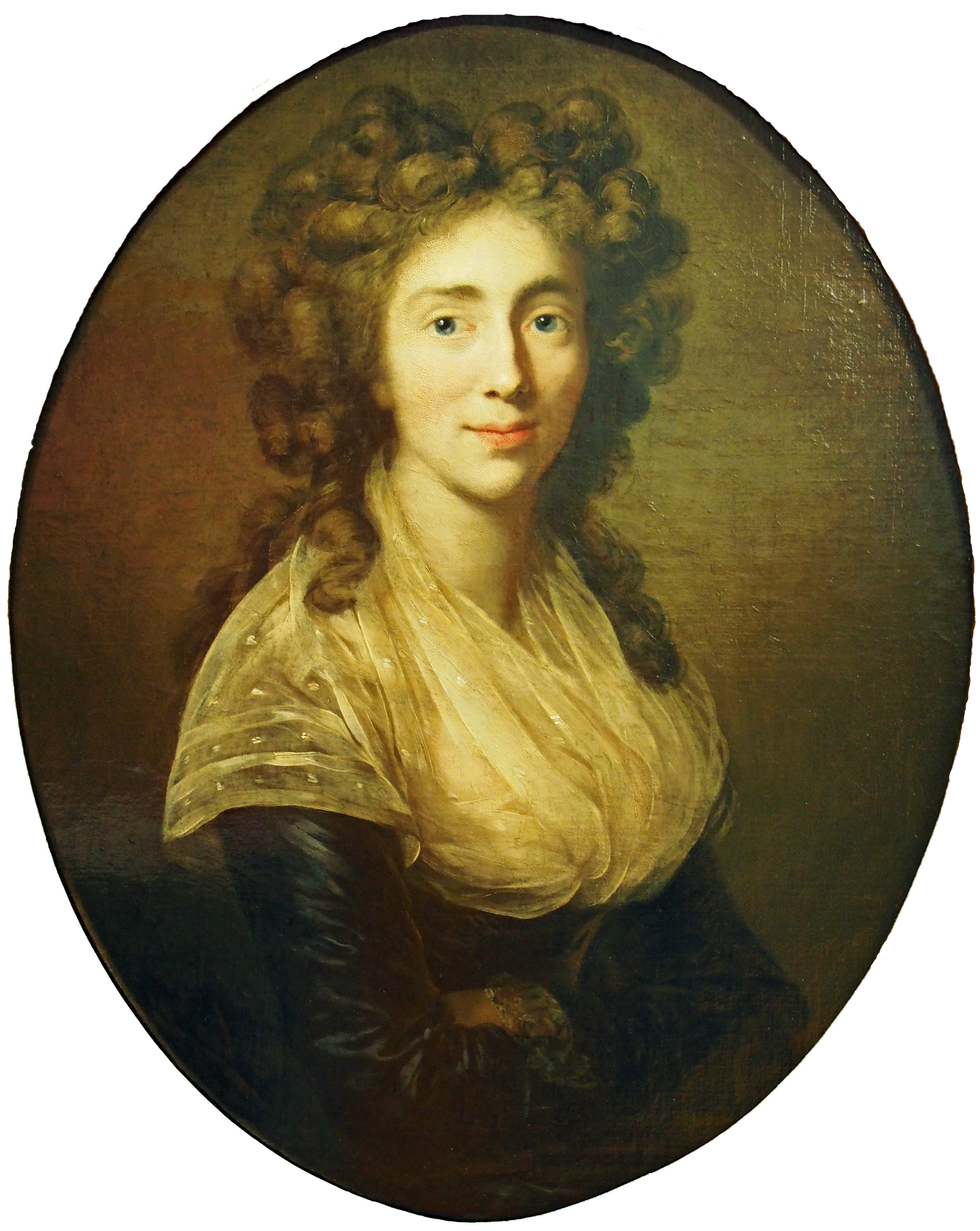 Tochter des Sigismund Ehrenreich von Redern, Ehefrau des Grafen Leopold zu Stolberg-Stolberg (* 4. November 1765; † 8. Januar 1842)